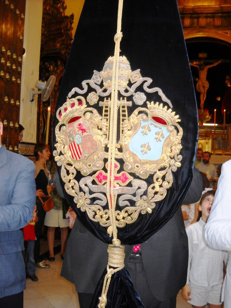 Escudo que aparece en el bacalao de la Hermandad